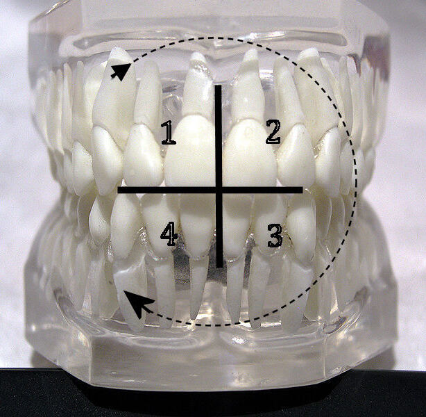 FDI-Zahnschema Quadranteneinteilung (aus Patientensicht gegen den Uhrzeigersinn)